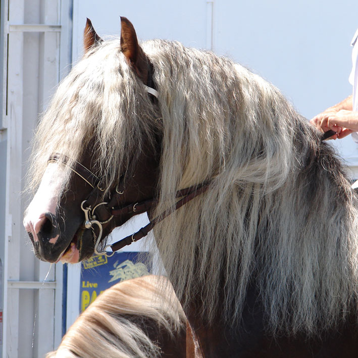 Schwarzwälder Kaltbluthengs auf der Eurocheval in Offenburg am 21. Juli 2006 fotografiert von Monika Kind